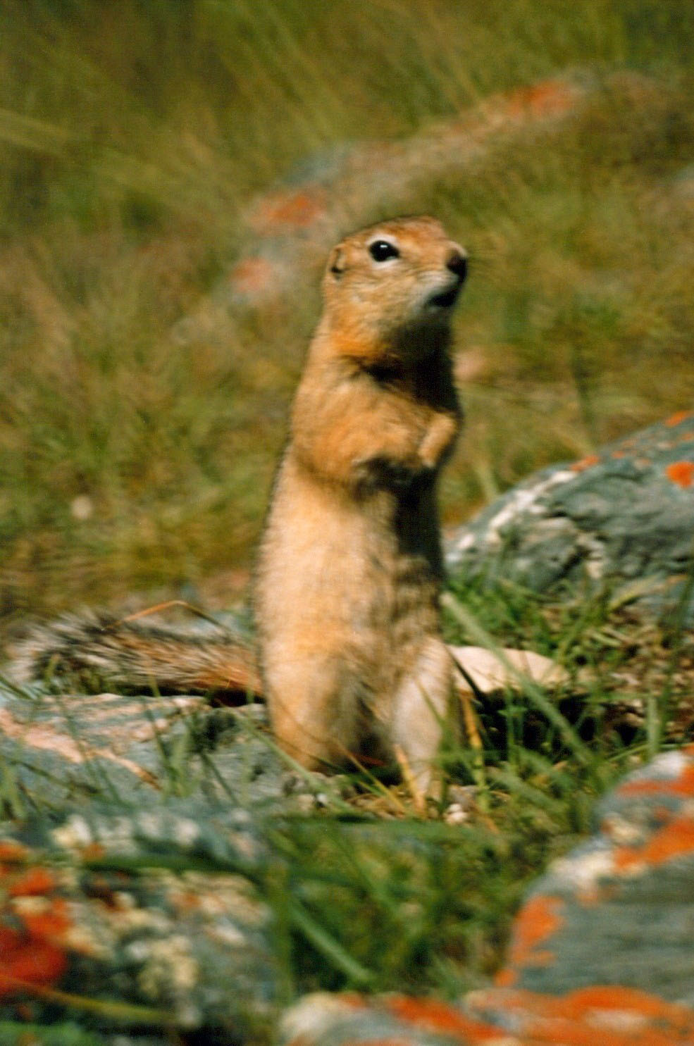 Suseł północny